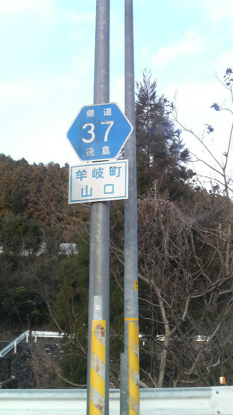 徳島県道37号標識